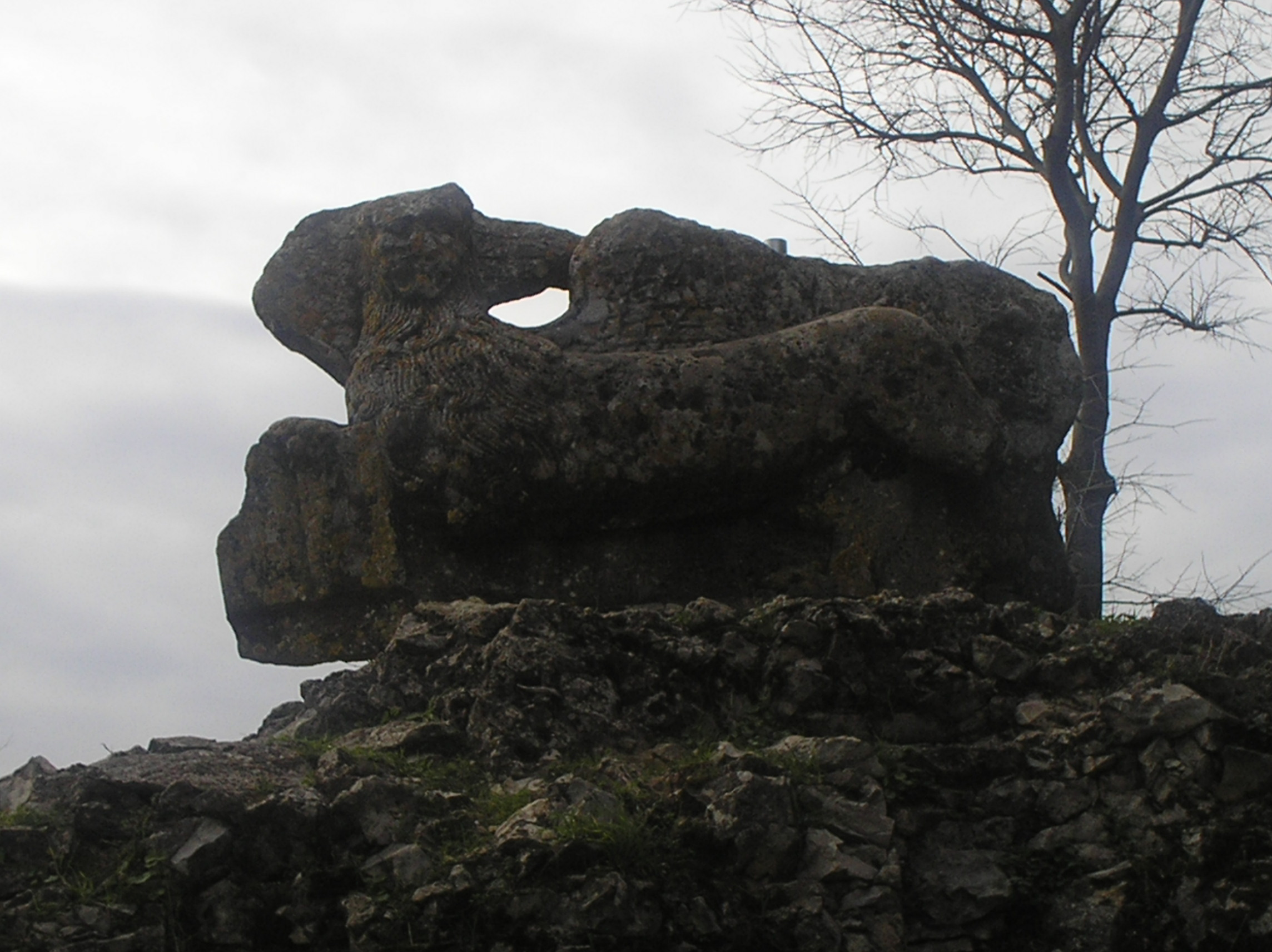 Lav u S.Gradu